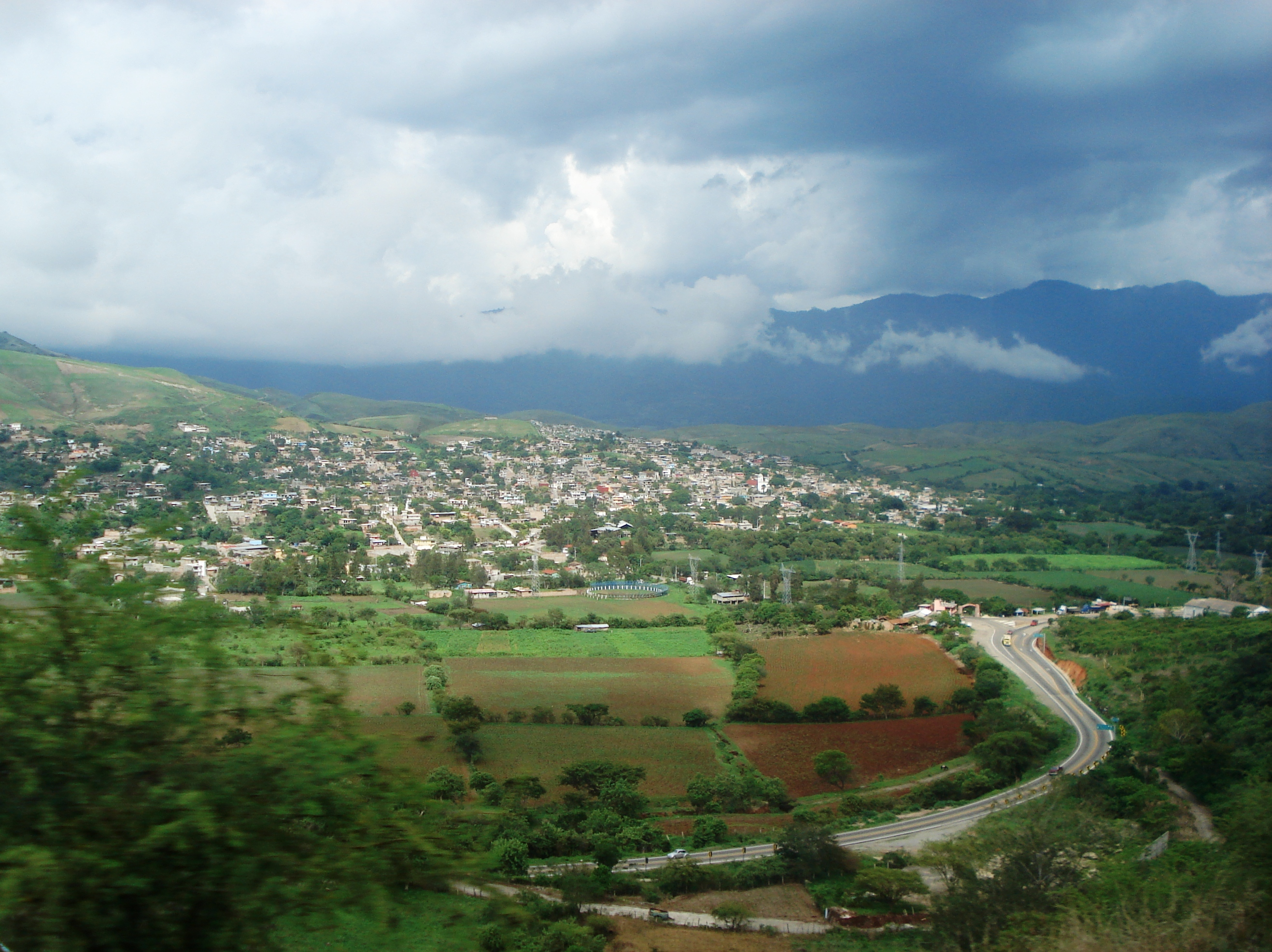 La localidad de Mazatlán y Carretera Federal 95, municipio de Chilpaningo de los Bravo, Guerrero, México. Vista desde la Autopista del Sol.